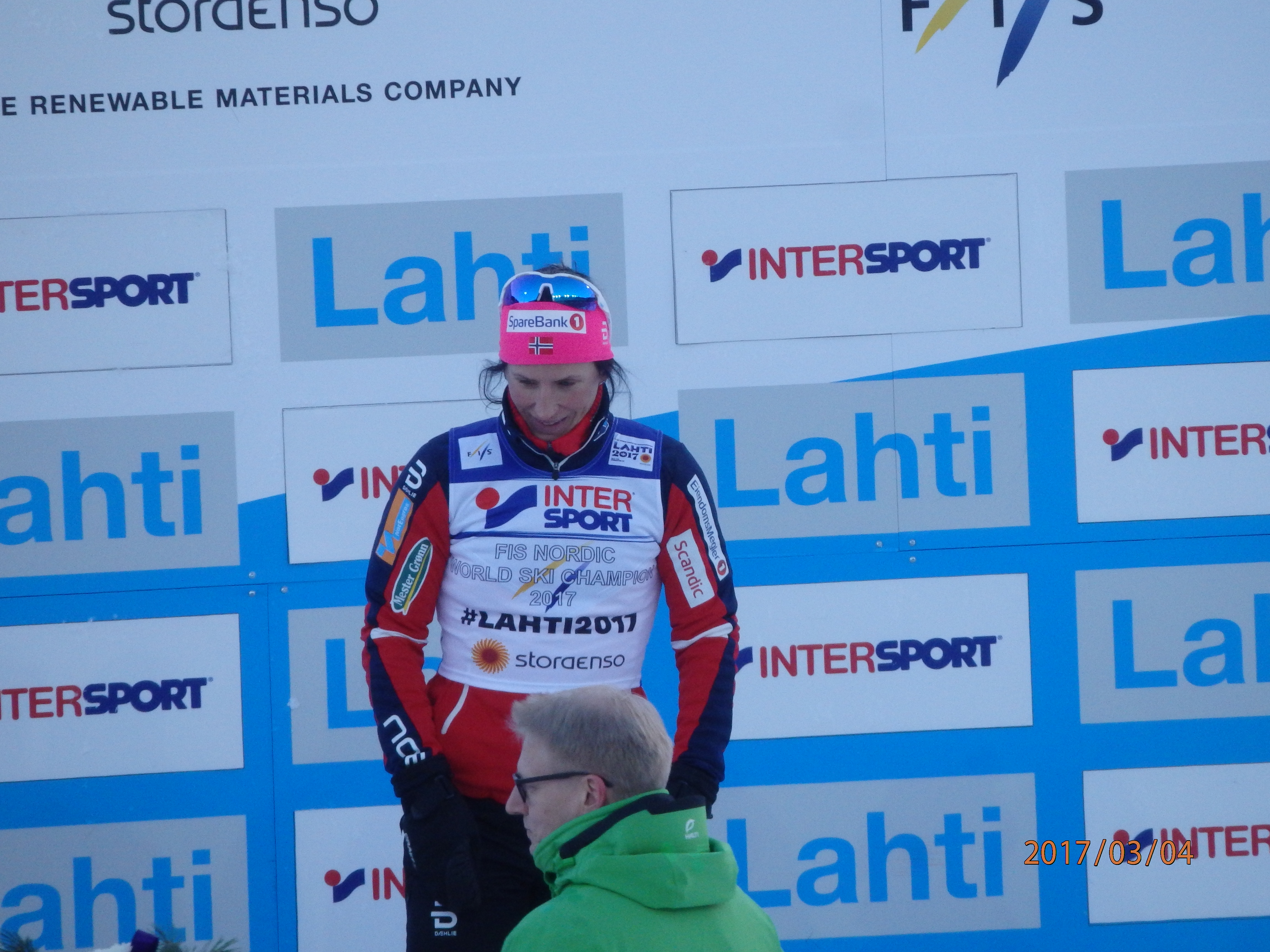 Marti Bjørgen under blomstersermonien etter 30km kvinner VM i Lahti 2017